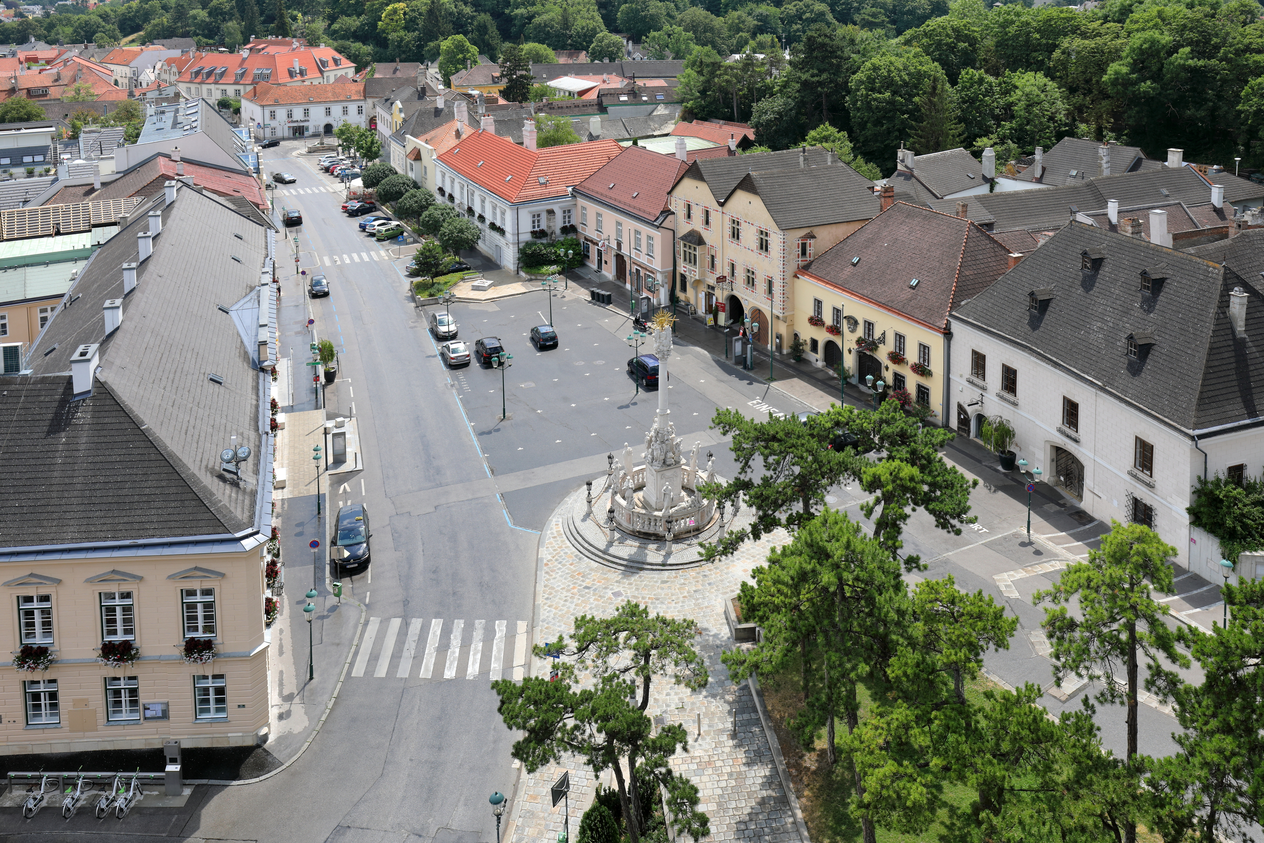 Blick vom Wehrturm Richtung Süden über den Marktplatz der niederösterreichischen Marktgemeinde Perchtoldsdorf.